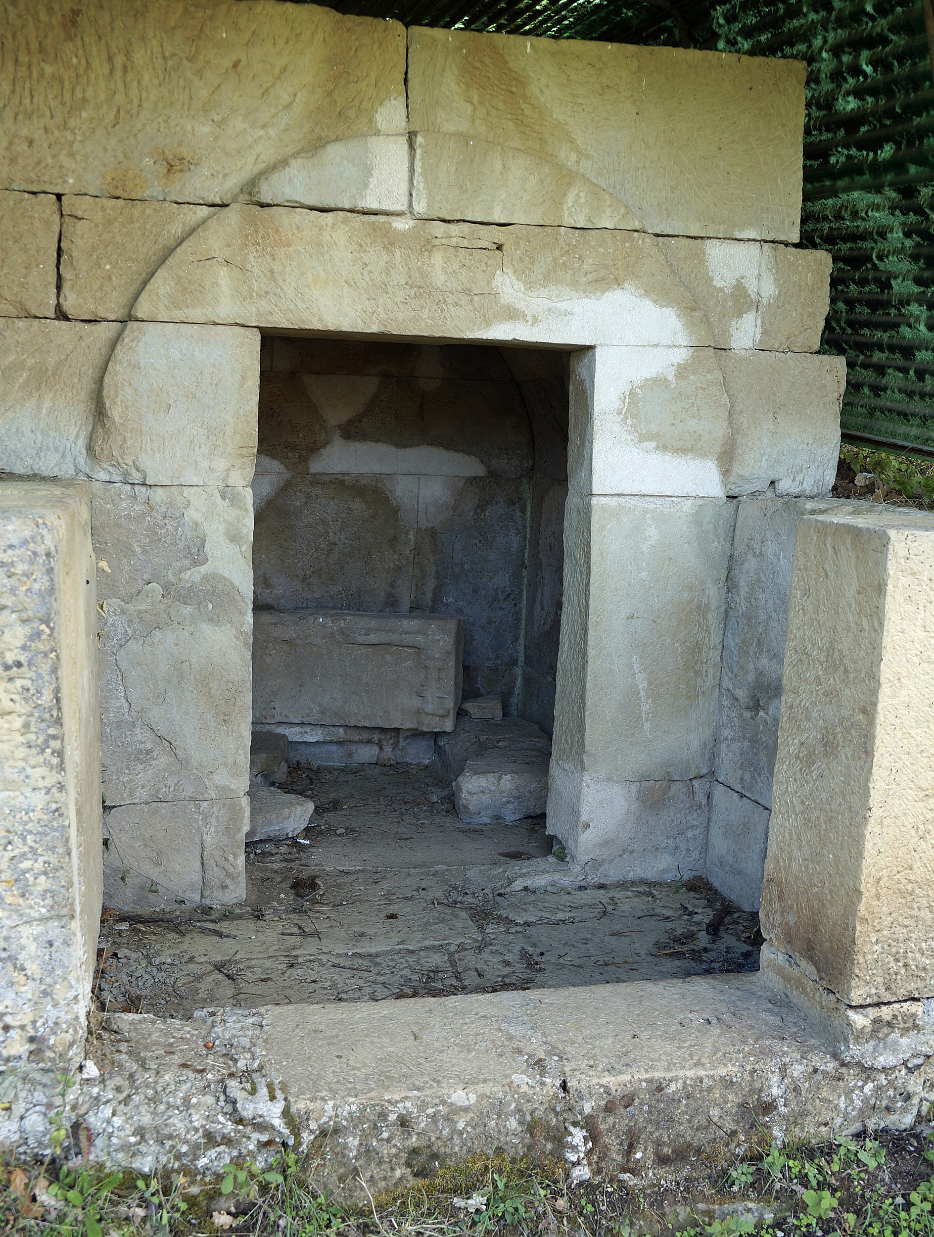 Selca e Poshtmë, Albania: tomb 5